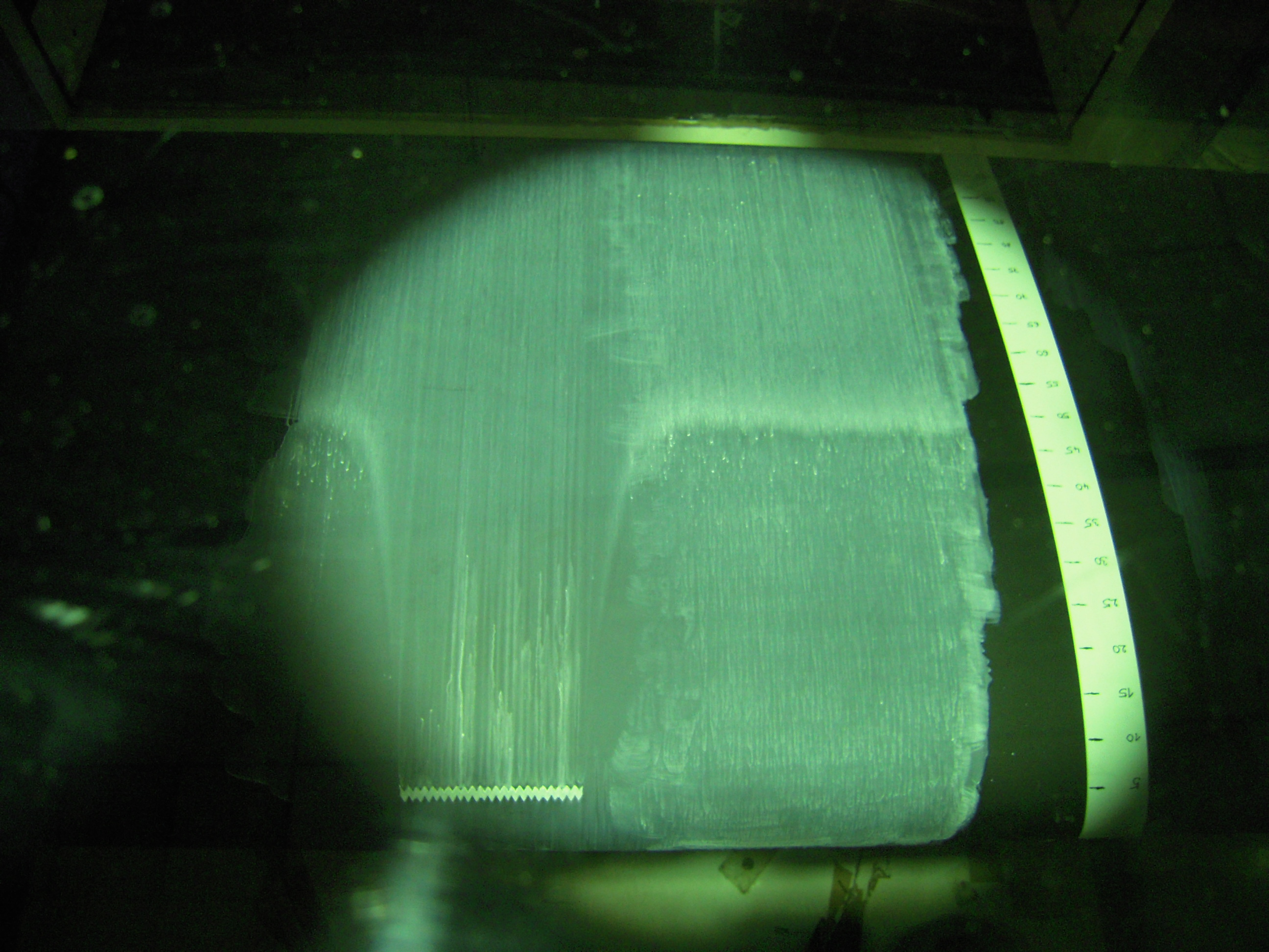 Strömungssichtbarmachung einer Tragflügelumströmmung mittels eines Anstrichs mit einer Mixtur aus Farbe und Öl.